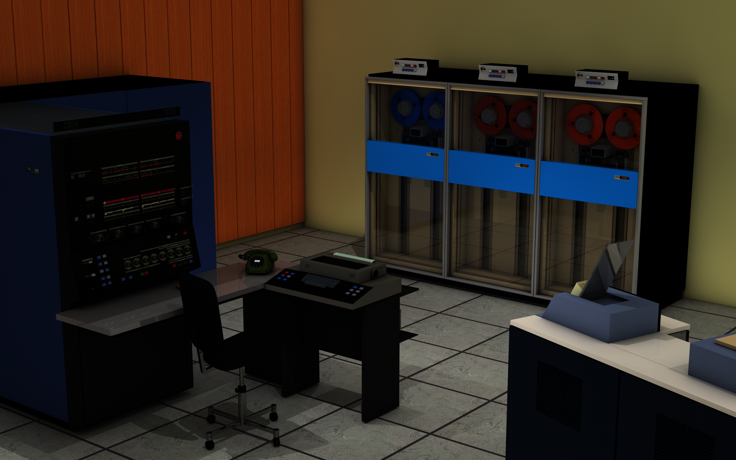 Rechenzentrum mit IBM System /370-145 und Bandlaufwerken 2401